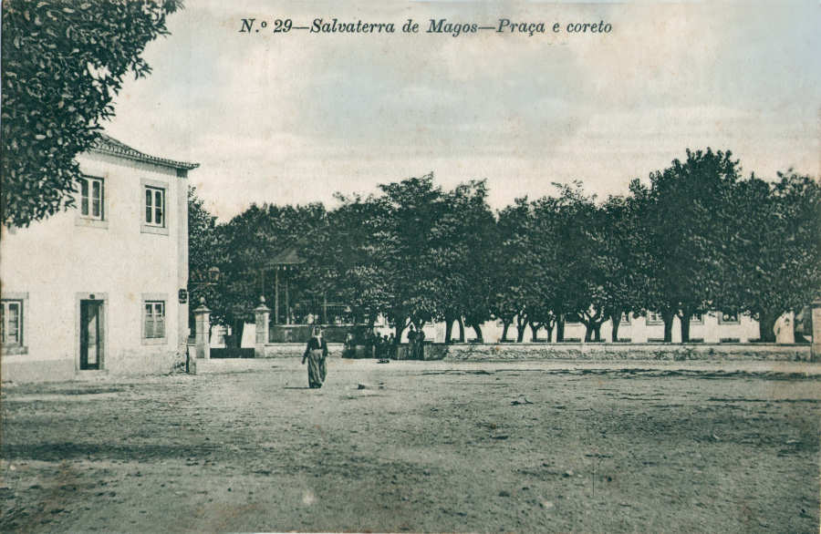 Salvaterra de Magos - Praça e coreto